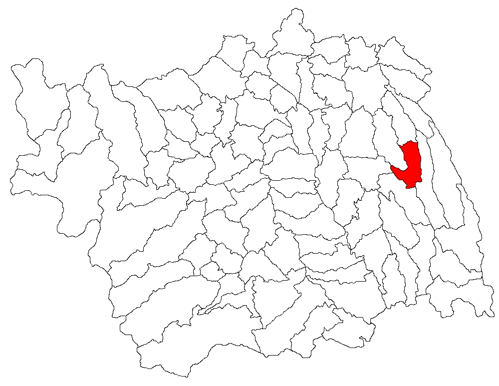 Categorie:Hărţi ale judeţului Bacău